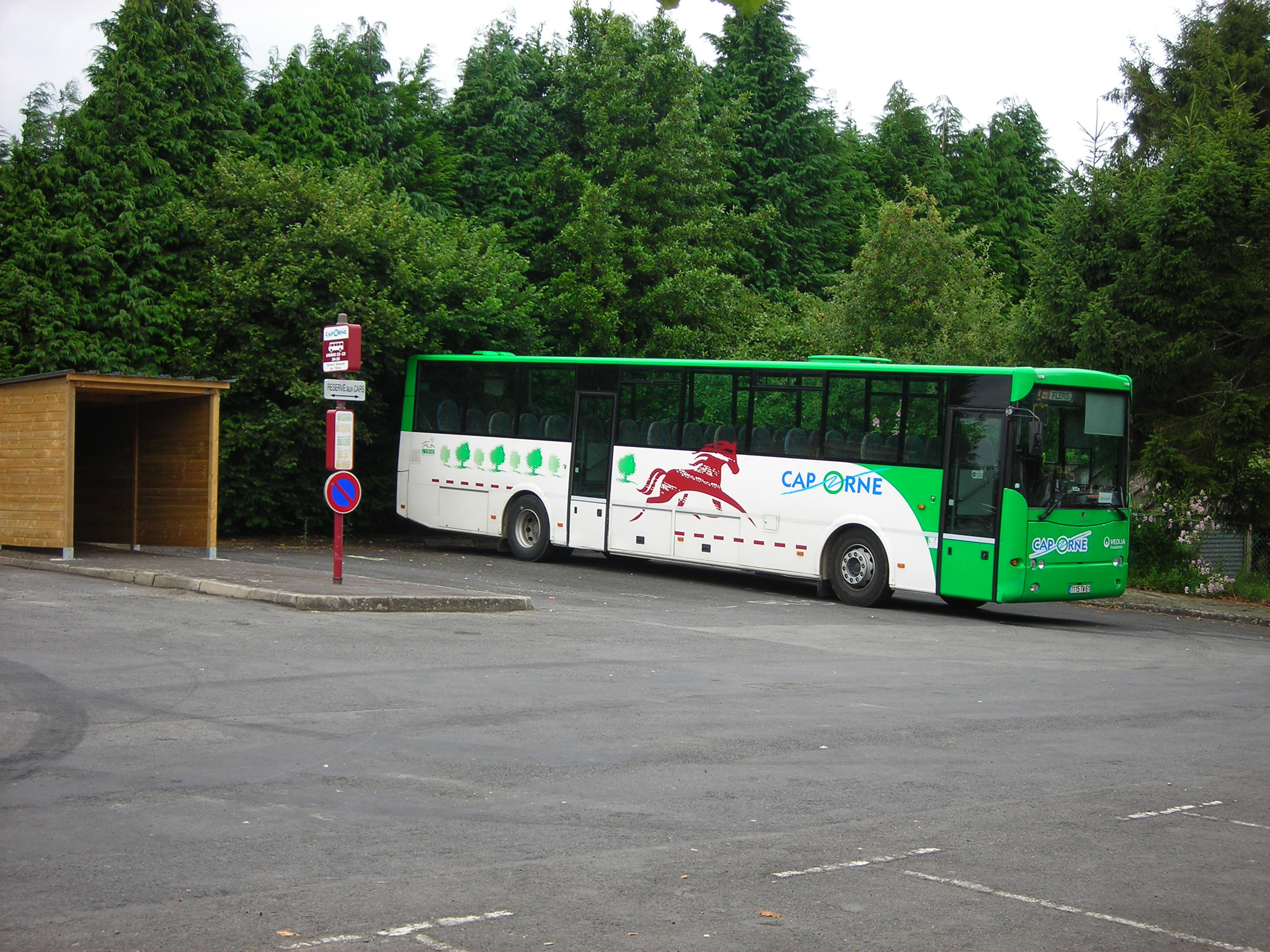 Autocar cap'orne (Transport interurbain de l'Orne, France)